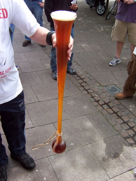 Preso da Wikipedia inglese Image:YardOfAle.jpg autore PeteVerdon, 13 March 2006